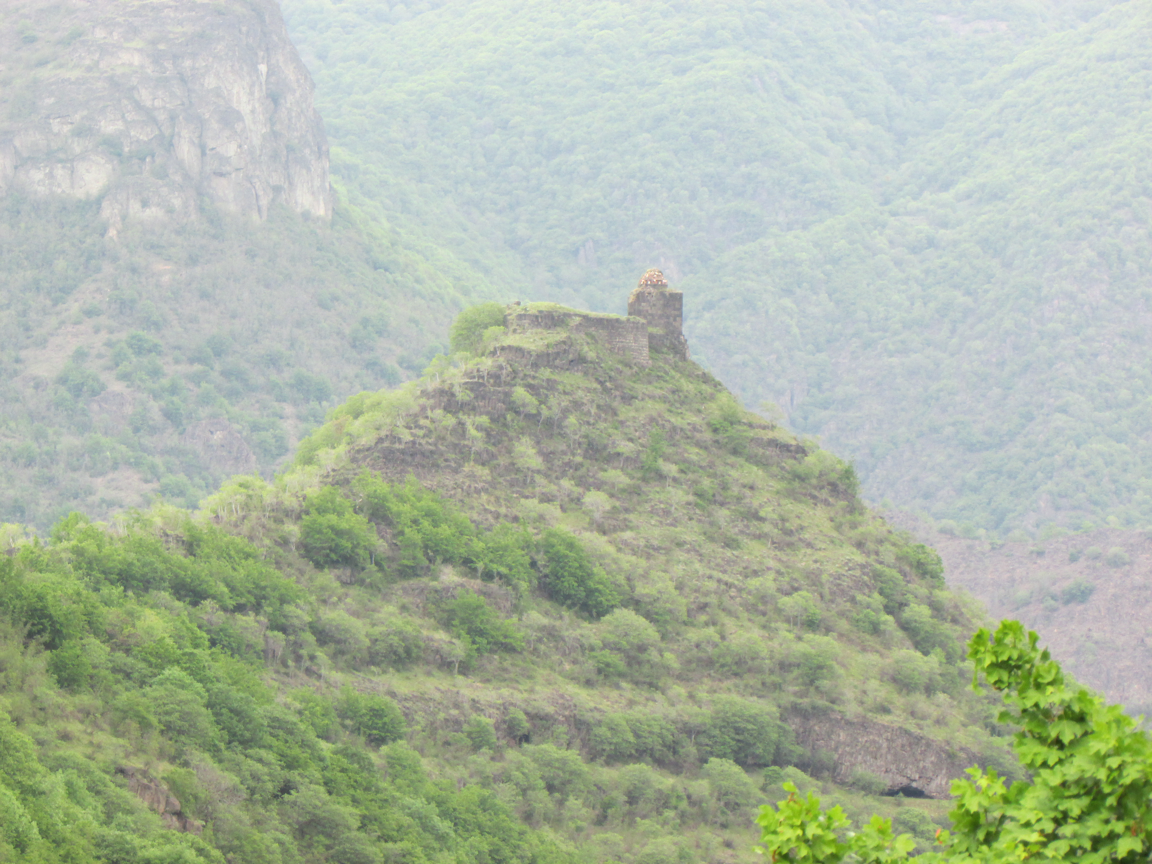 Ամրոց «Կայանբերդ» 60/2